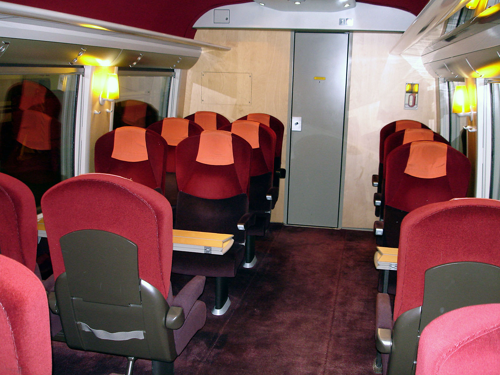 Z 21500 en gare de Paris-Austerlitz, France. Intérieur de 1ère classe.